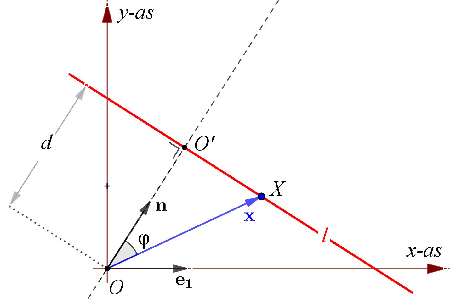 visualisering Hesse-vergelijking